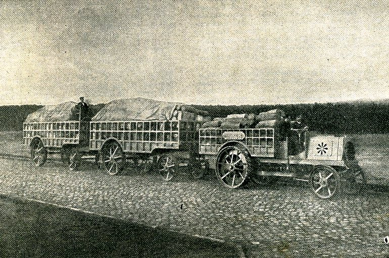 Un train automobile pour l'Afrique occidentale